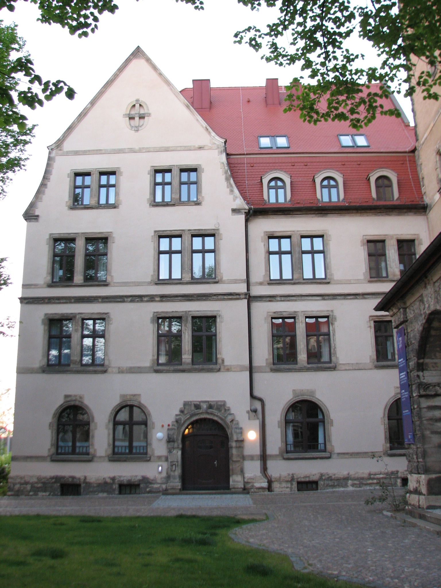 Philippus-Integrationshotel Leipzig, Foto vom April 2019